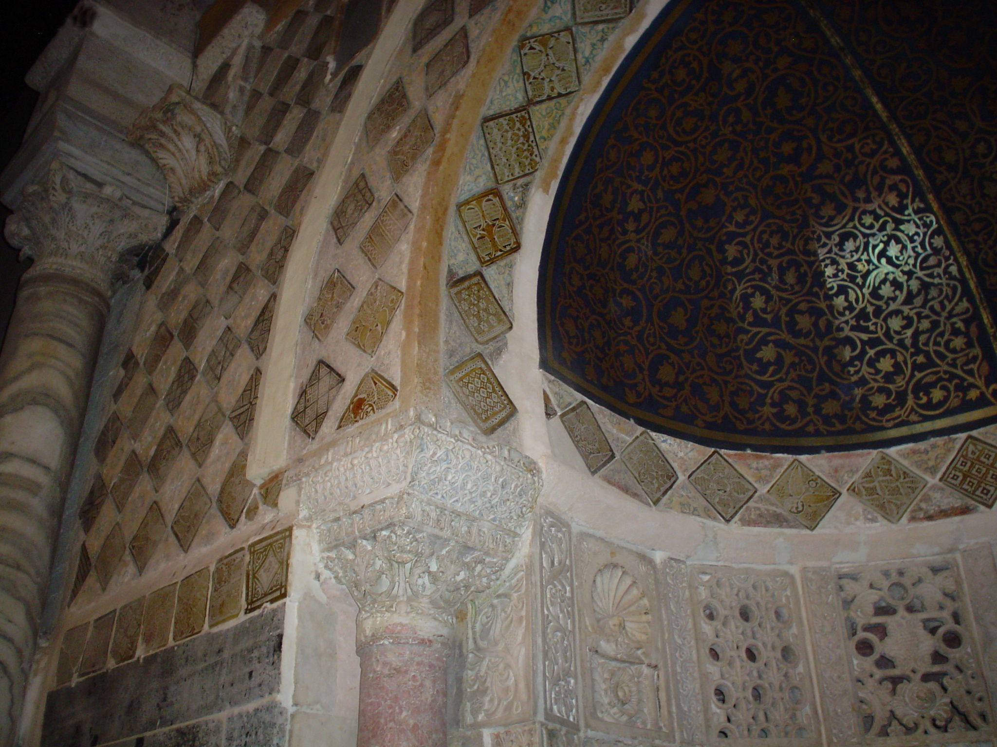 Oqba Ibn Nafi Mosque, Kairouan, Tunisia. Vue partielle du mihrab de la Grande Mosquée de Kairouan, en Tunisie.